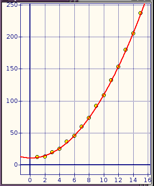 Example of Non Linear Regression: f(x) = 10+x^2+error